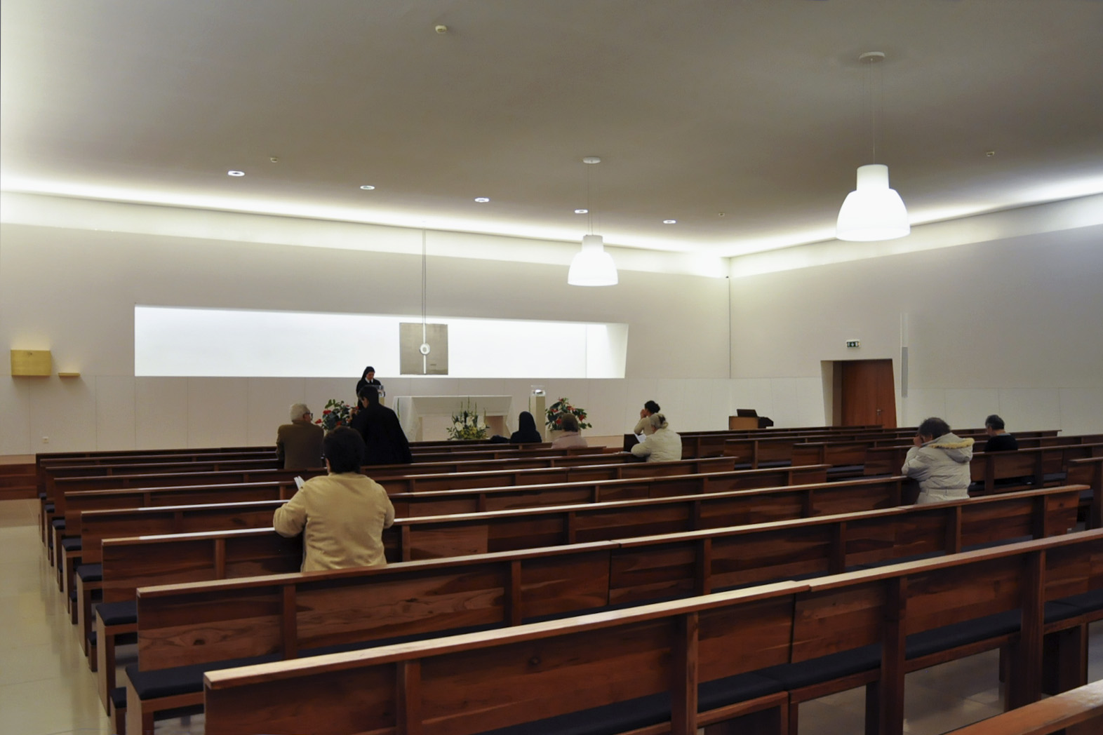 Capela do Santissimo Sacramento